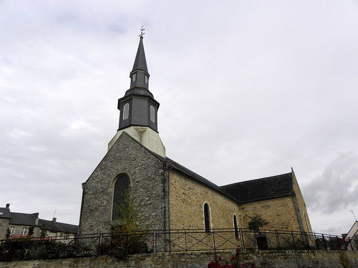 Façade occidental et flanc méridional de l'église Saint-Sulpice à Montreuil-le-Gast (35).